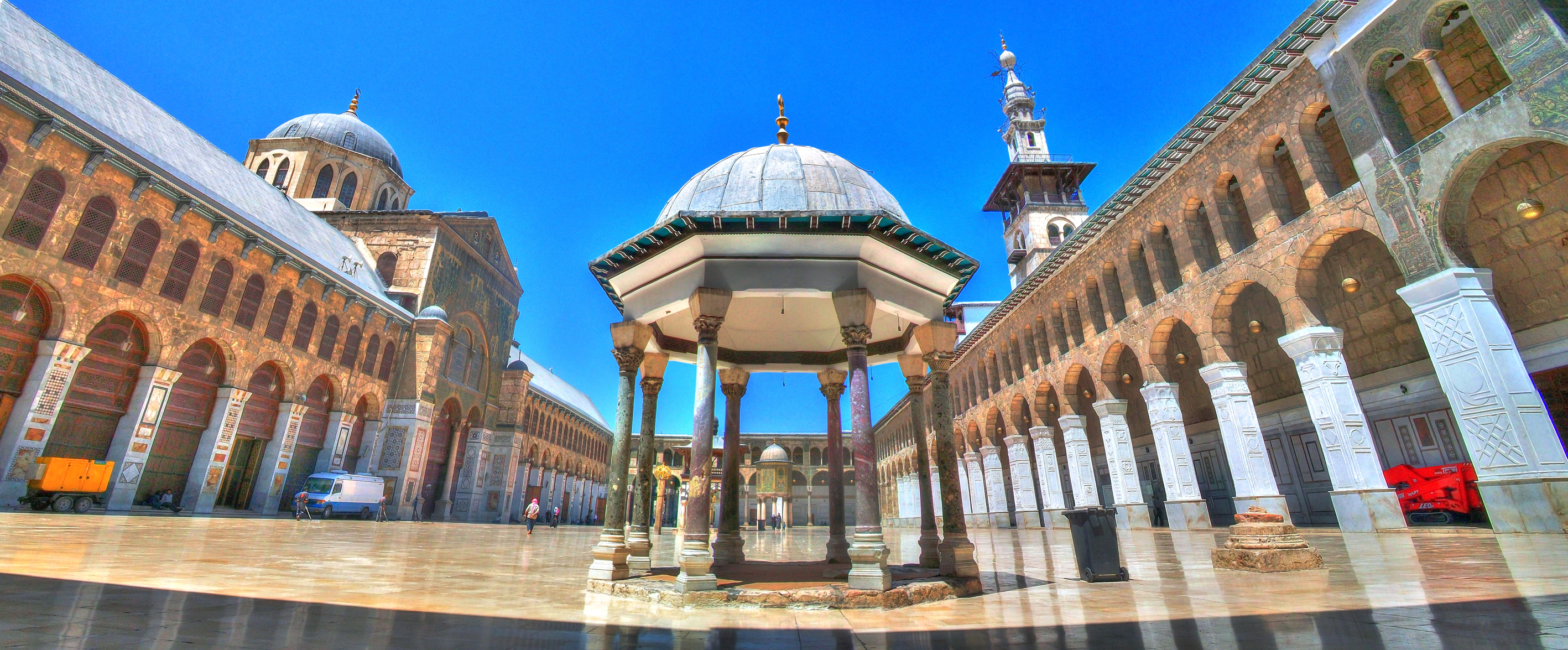 دمشق القديمة